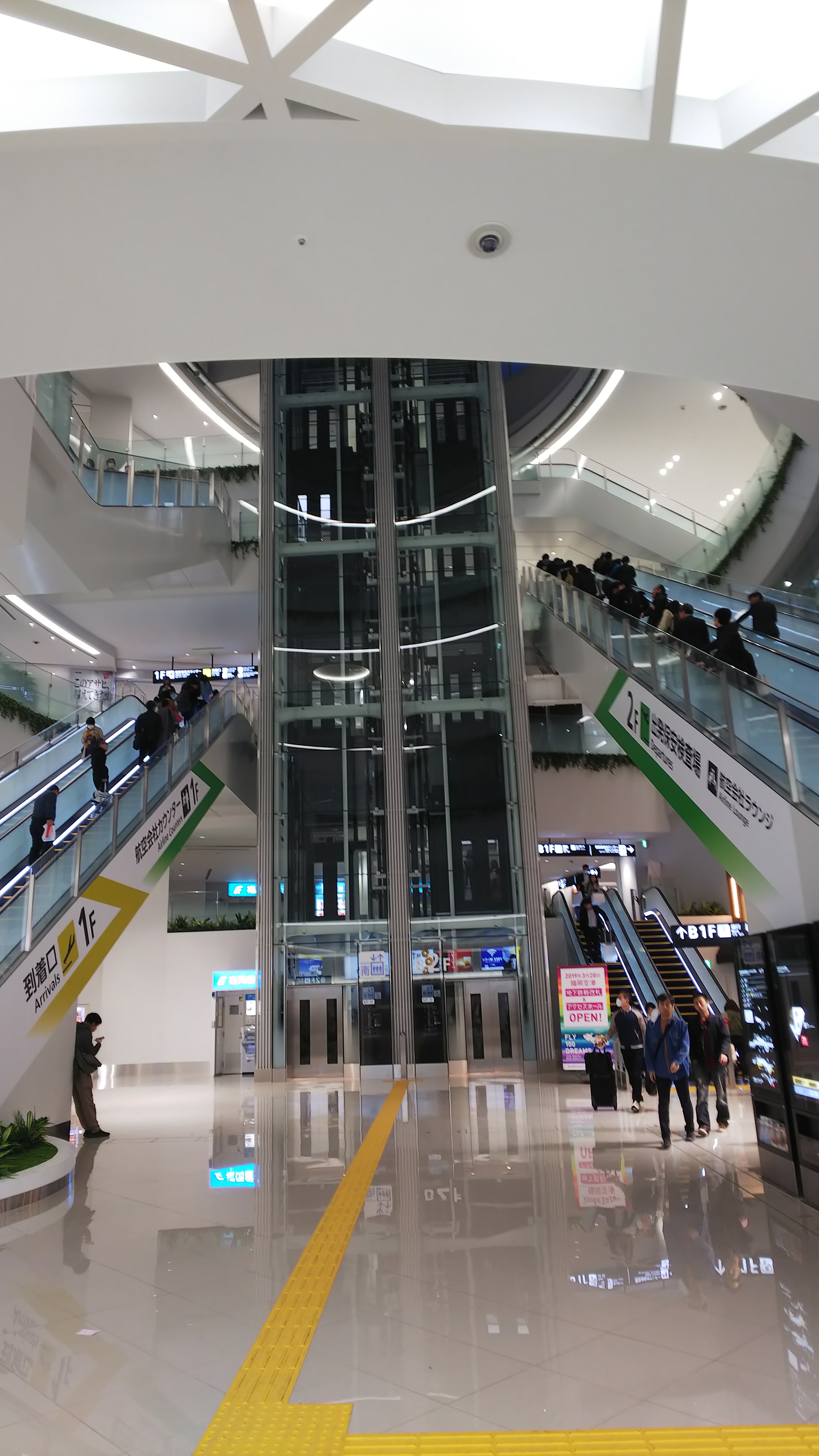 福岡空港アクセスホール